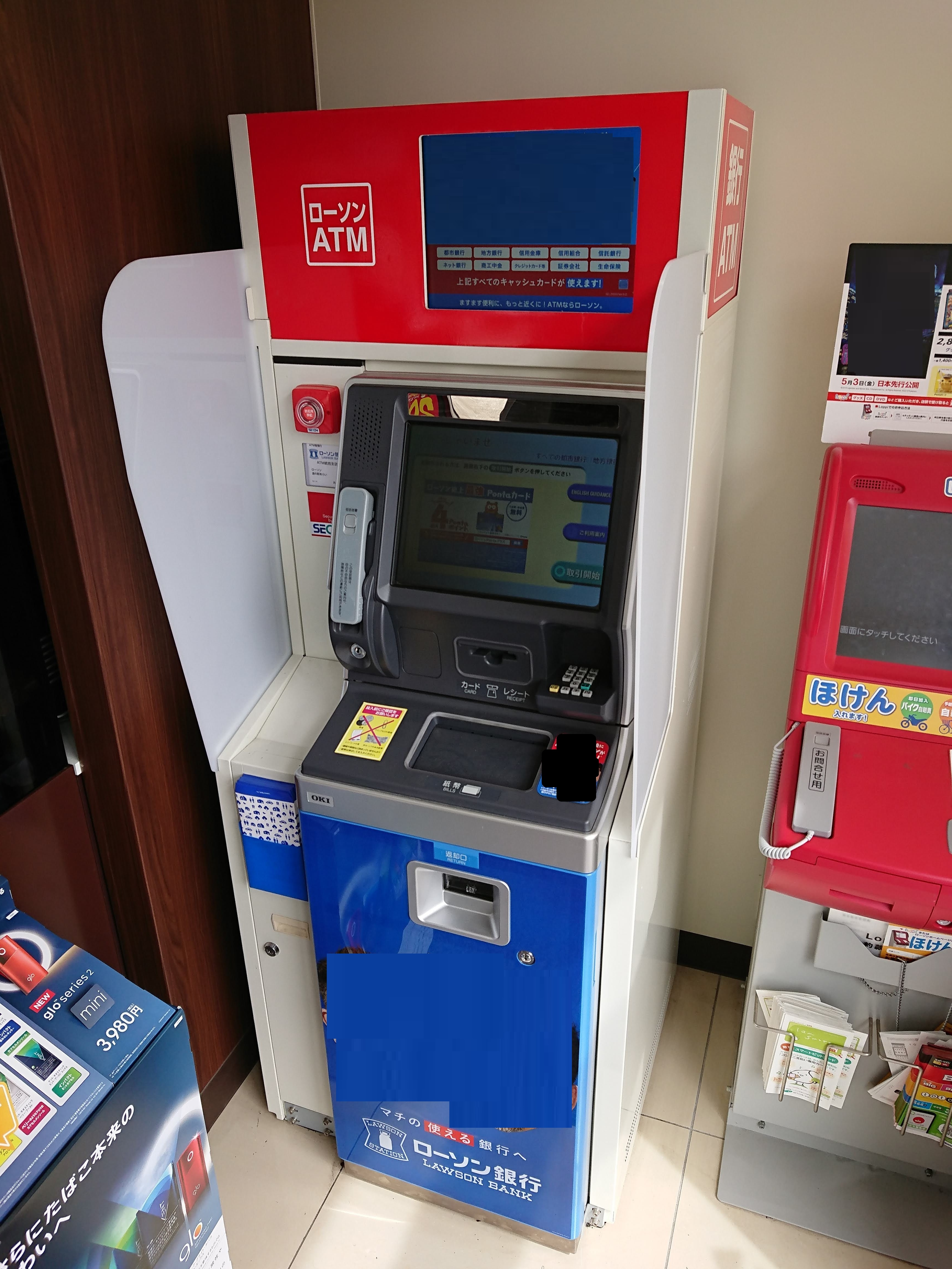 2019年現在ローソンに設置されているATM機器。「ローソン・道の駅あらい店」（新潟県妙高市大字猪野山58-1）にて。